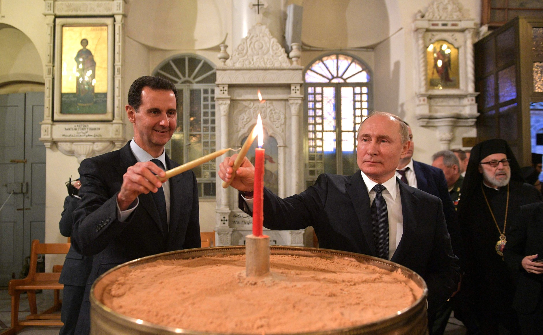 В православной церкви Святой Девы Марии. С Президентом Сирийской Арабской Республики Башаром Асадом